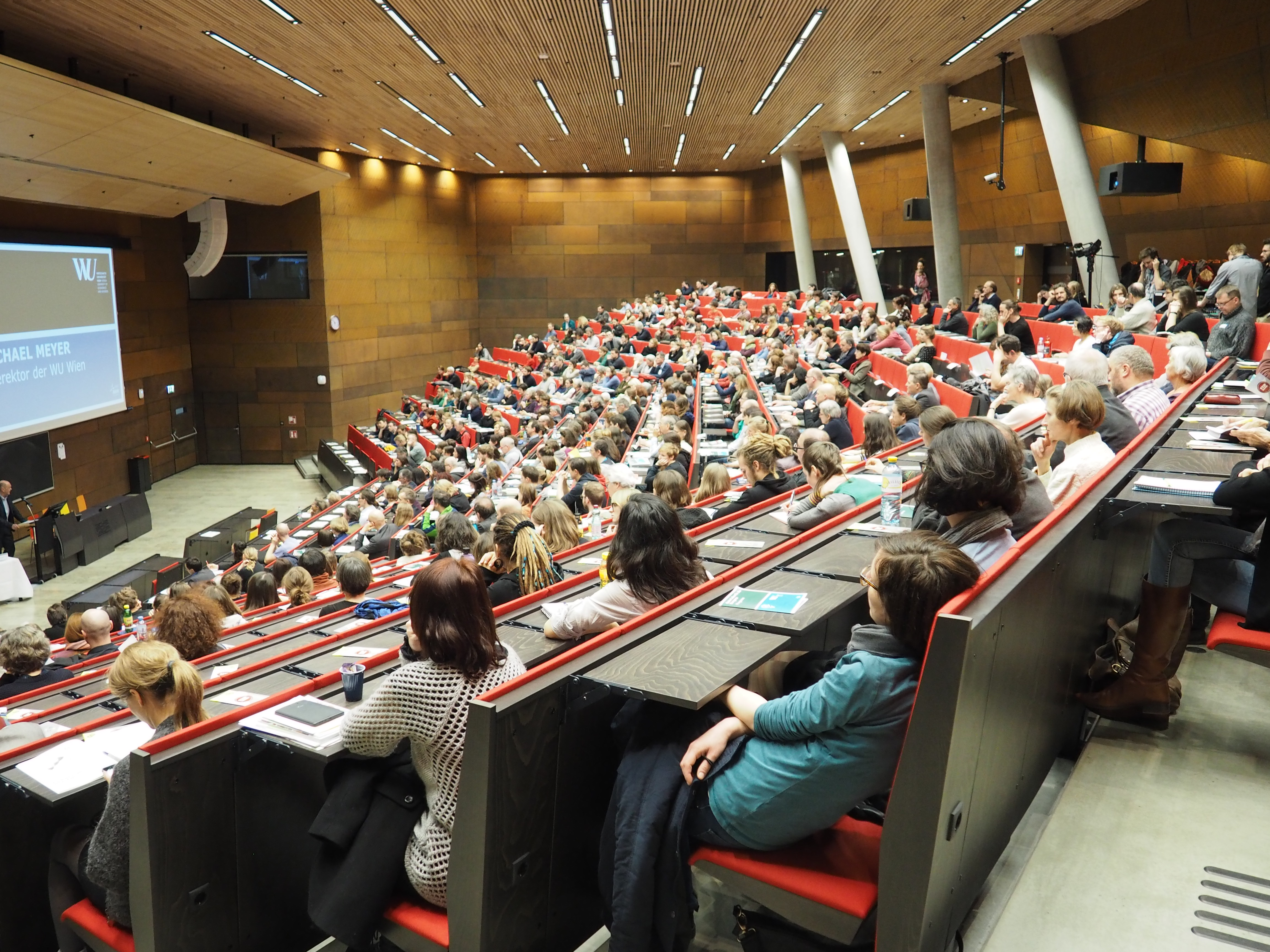 Audimax der WU Wien am 20. Februar 2015